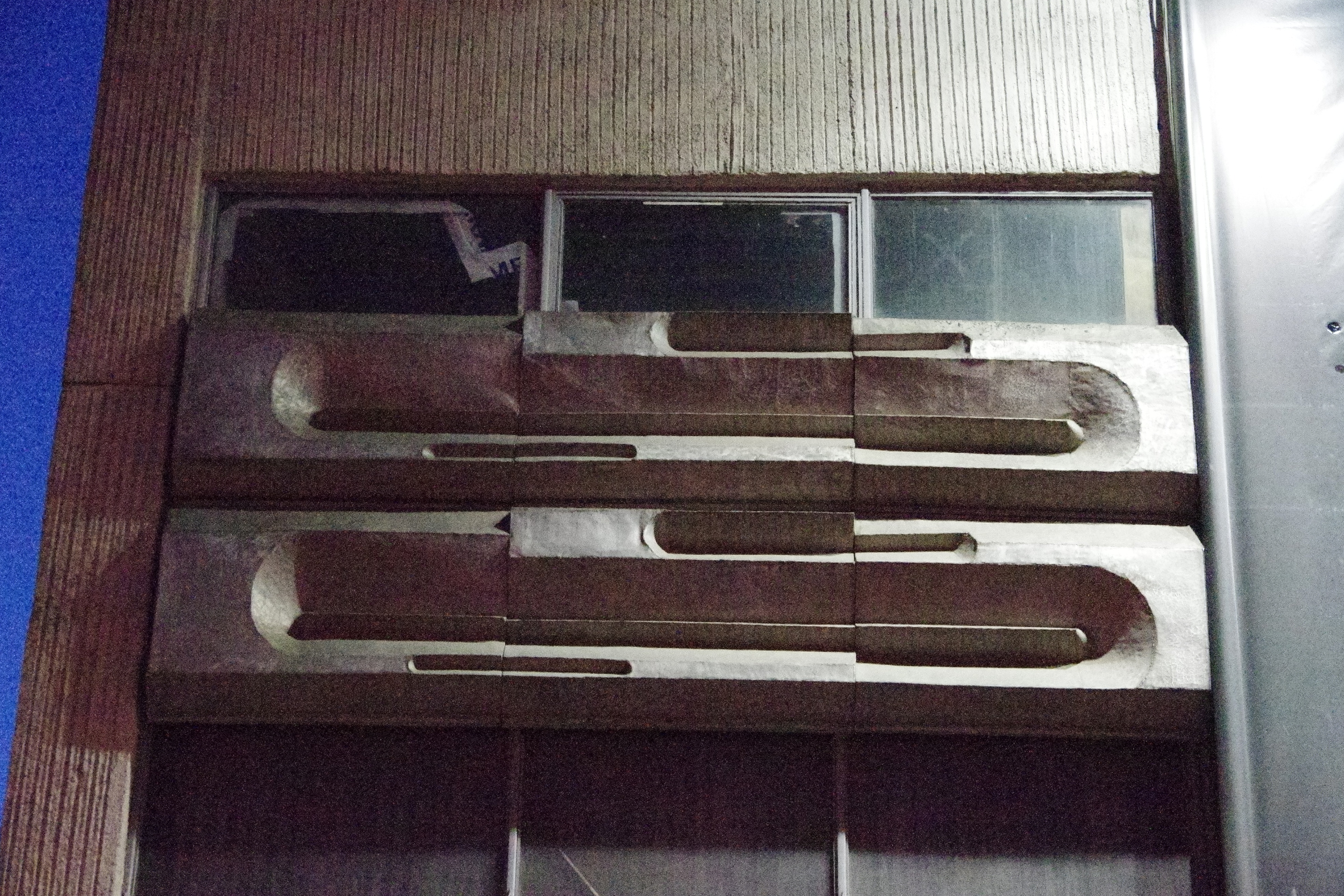 Minsk, Belarus